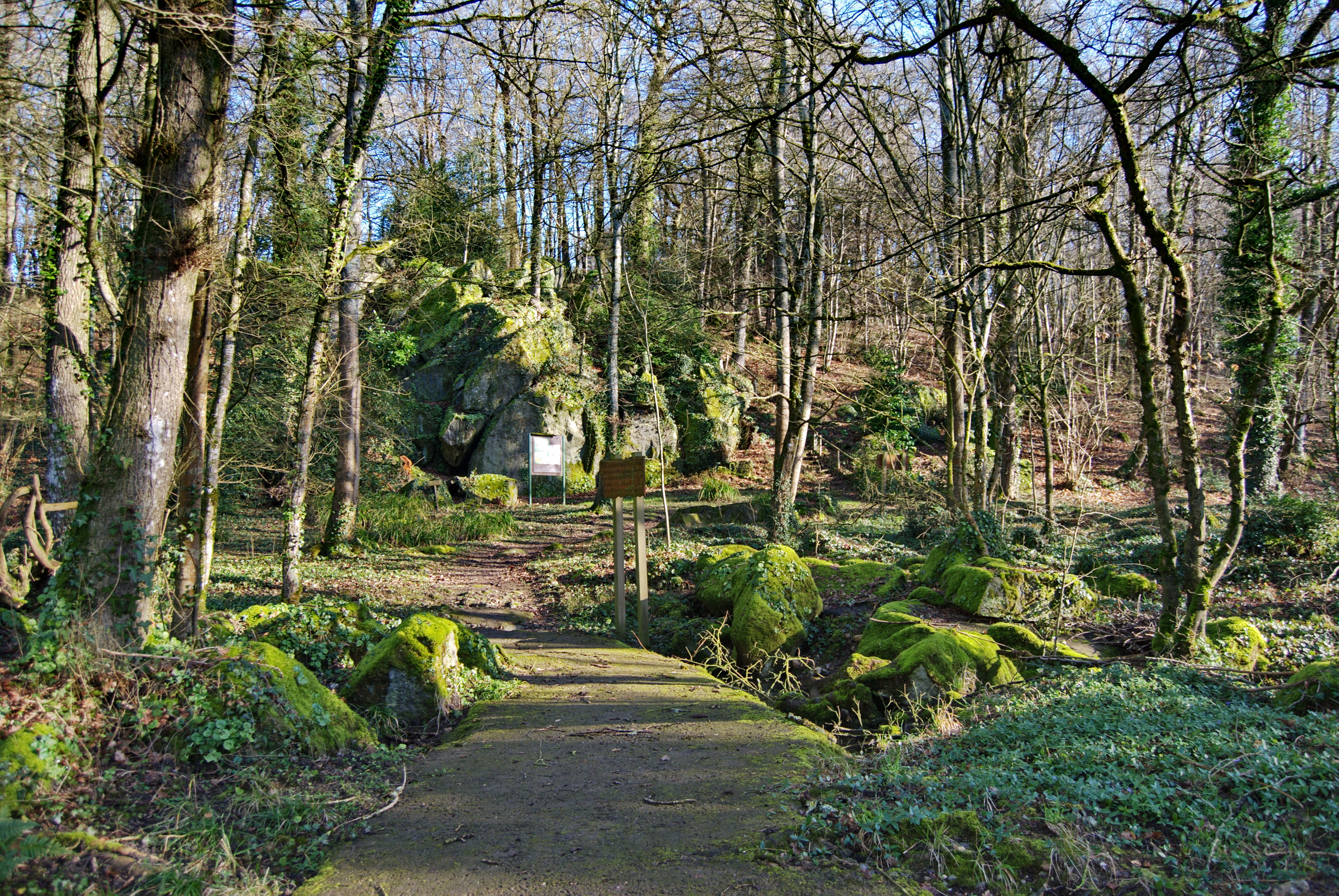 Lanrelas - Le site des Aulnais